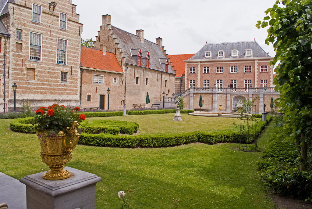 Franse tuin van Markiezenhof. ( (Tuin grenst aan tuinzalen, Franse tuin naar een ontwerp van Liesbeth Canneman-Philipse en haar man Elias Canneman in de jaren '60))